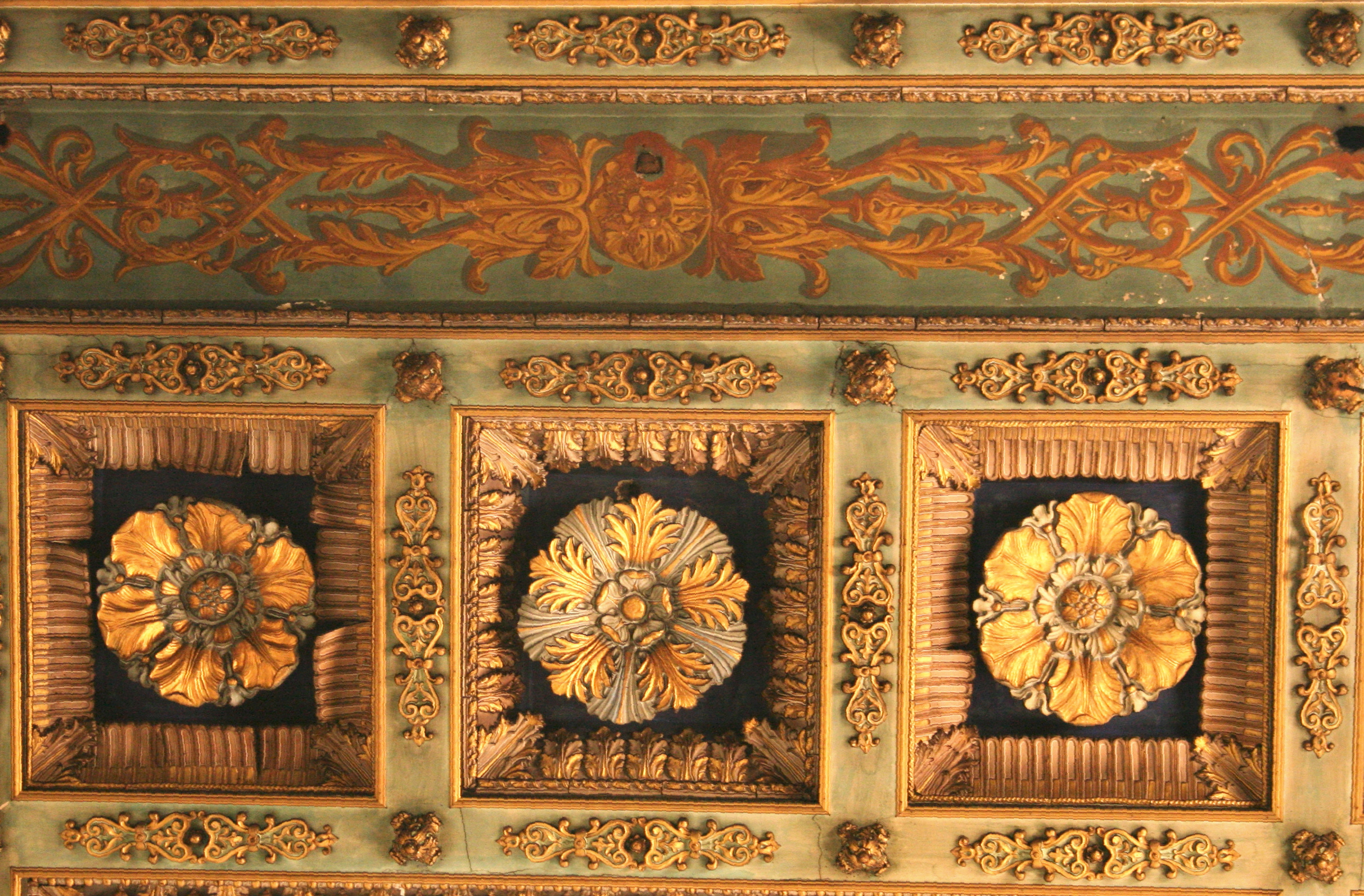 église Saint-Joseph de Marseille (124 rue Paradis) - détail du plafond à caissons.